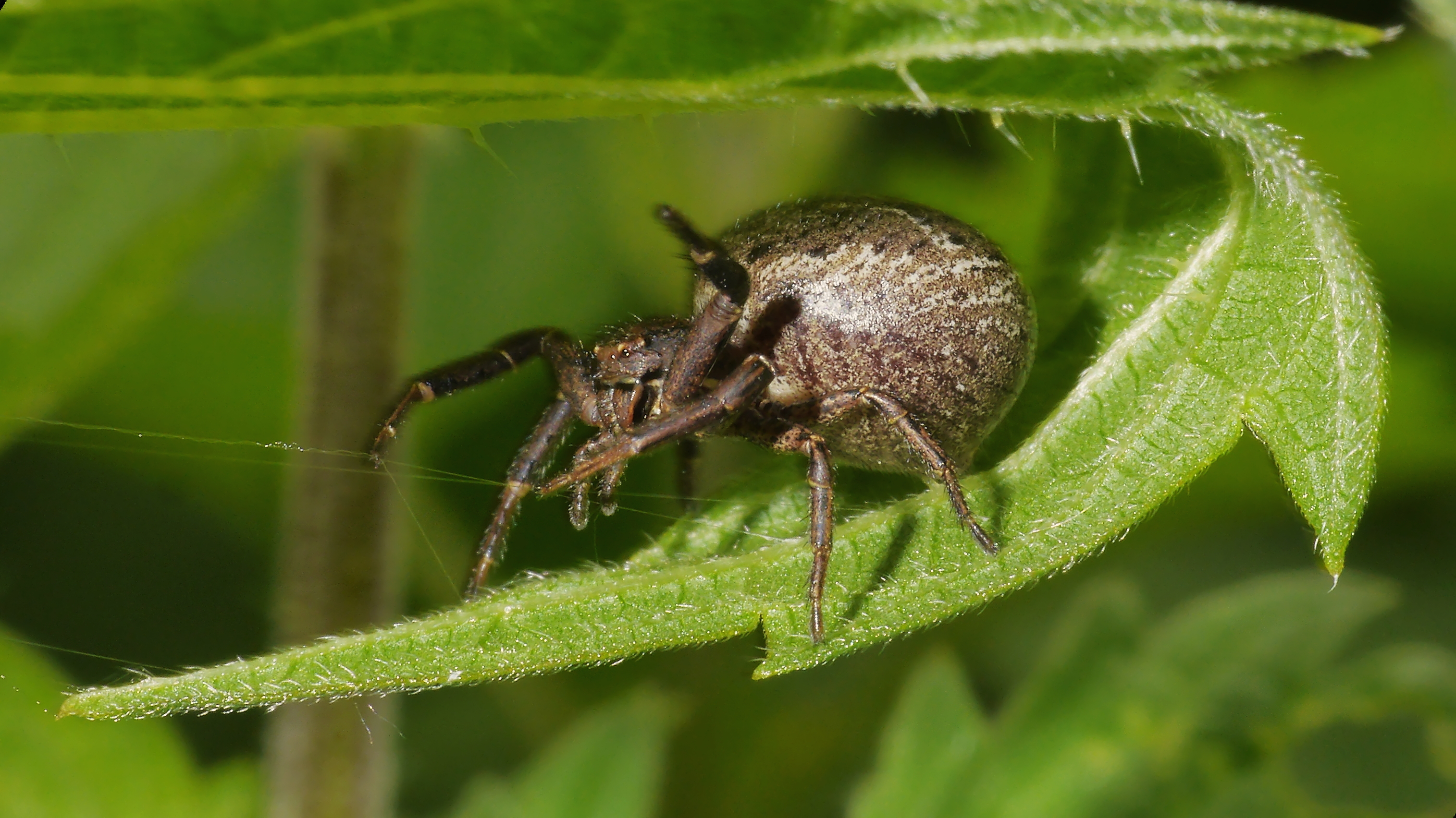 Krabbenspinne - Xysticus audax, Weibchen. Aufgenommen in Mannheim, Kirschgartshäuser Schläge, Baden-Württemberg, Deutschland.